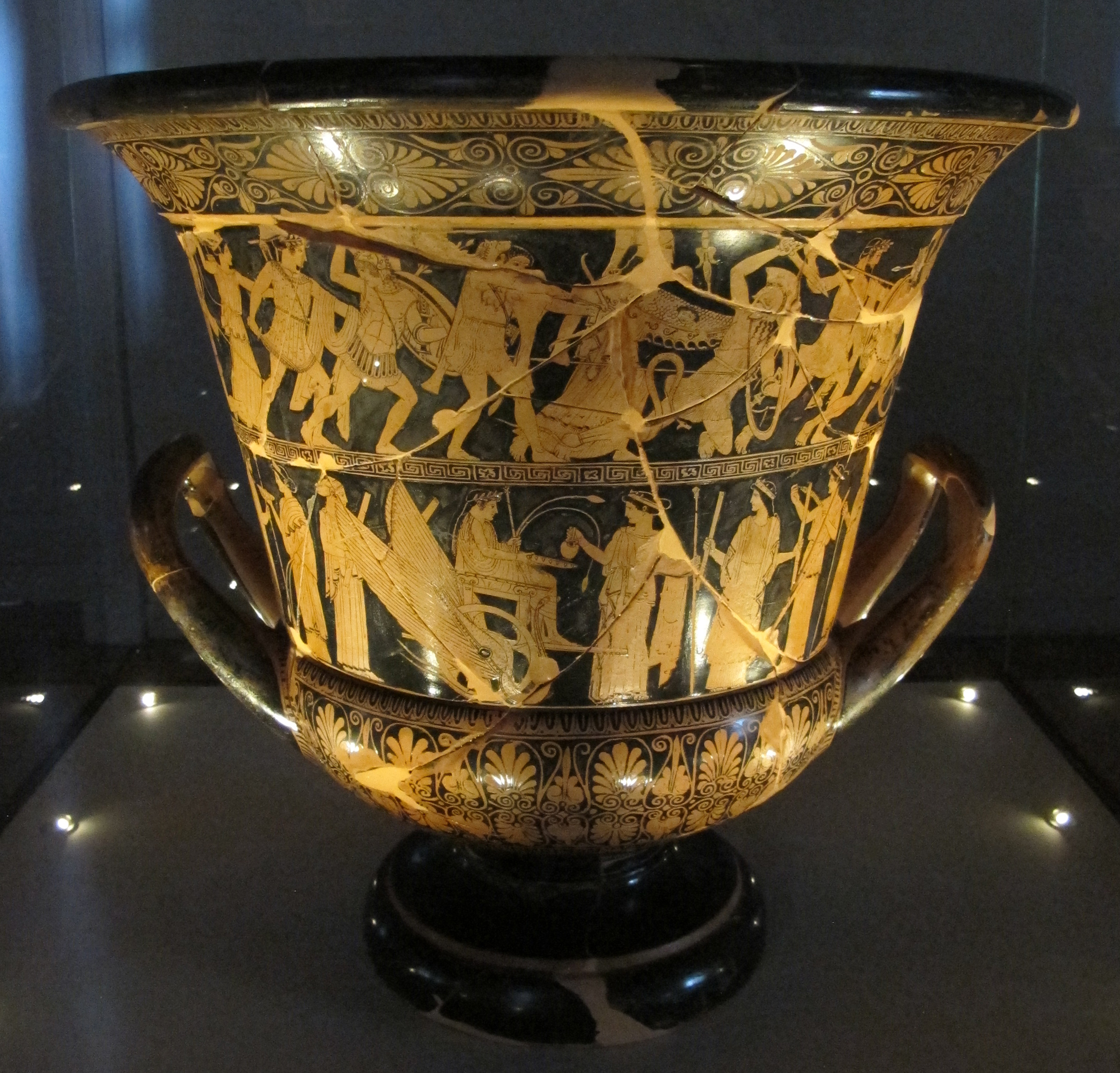 Museo Archeologico Nazionale - MIBAC This is a photo of a monument which is part of cultural heritage of Italy.